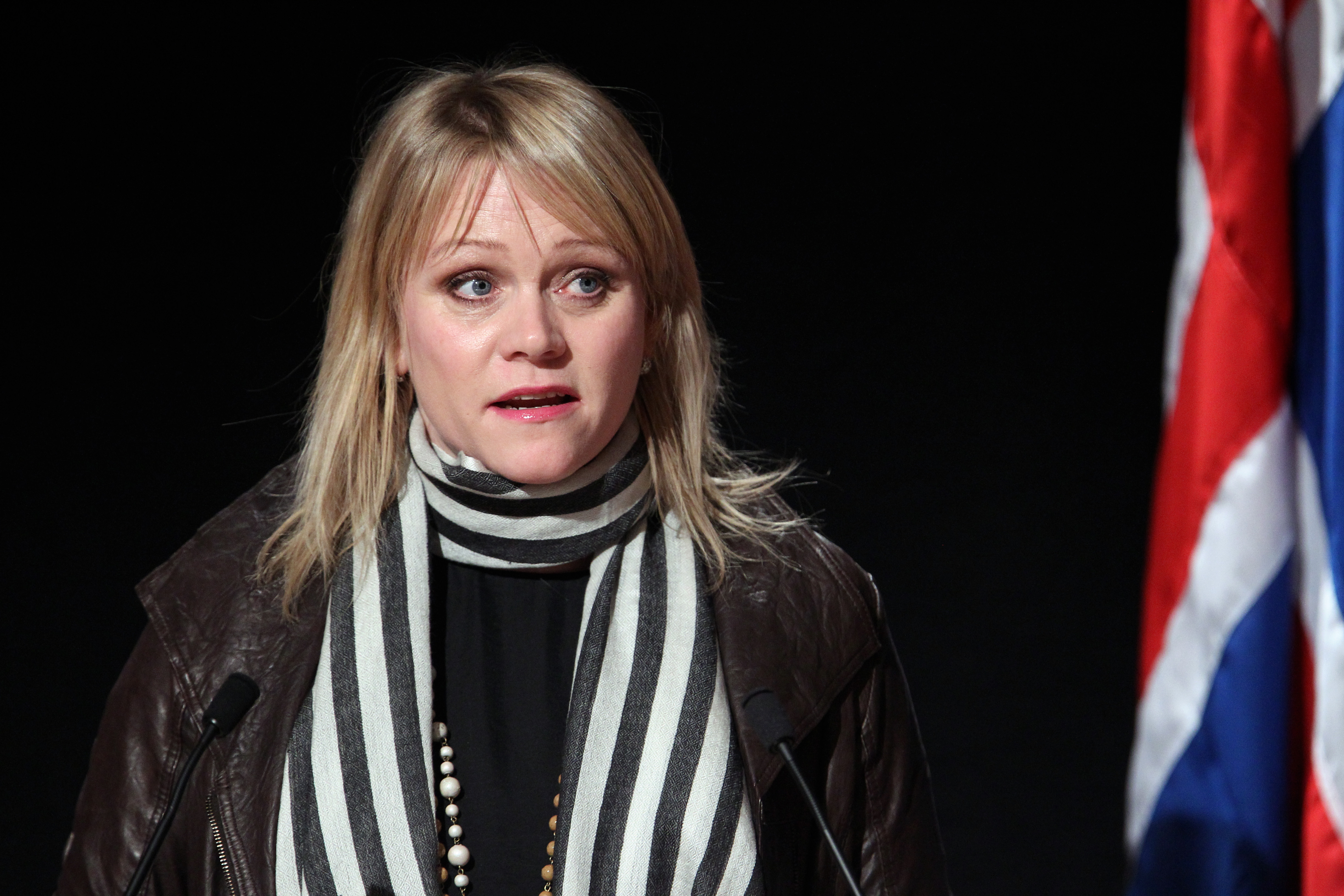 Katrín Júlíusdóttir, näringsminister Island. Nordiska rådets session i Reykjavik 2010.